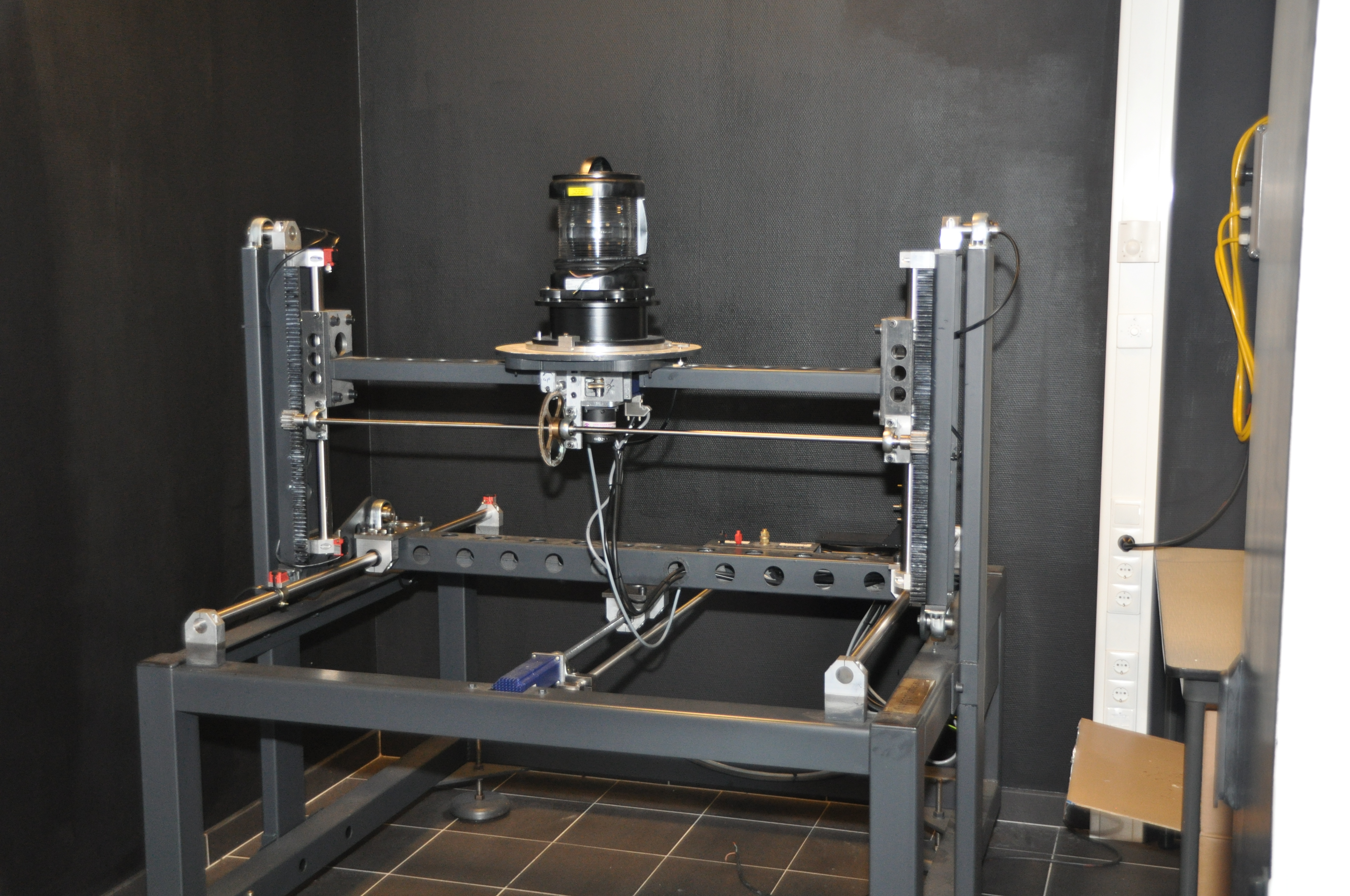 DHR Den Haan Rotterdam (maar in Capelle)